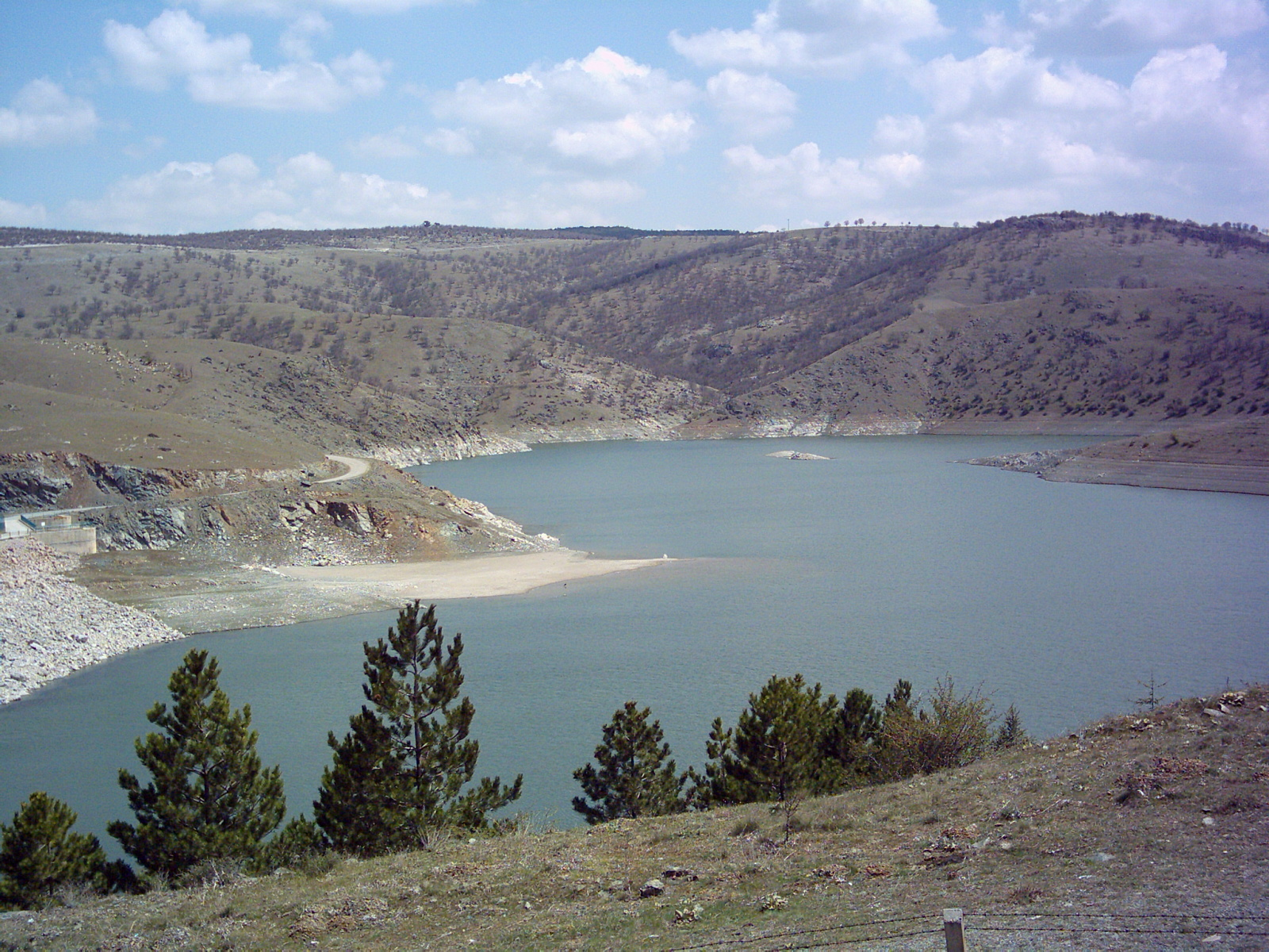 Çatören Barajı Seyitgazi/Kırka/ESK